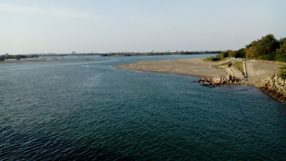 即原台江內海 目前少數在台南境內僅存的水域